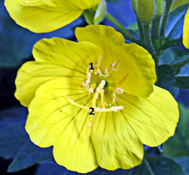 аутор Снежана Трифуновић Цвет